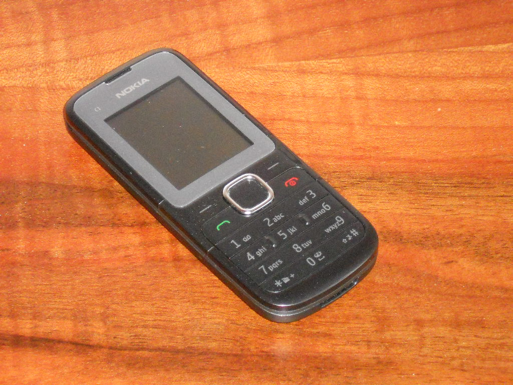 Telefon marki Nokia modelu C1-01.